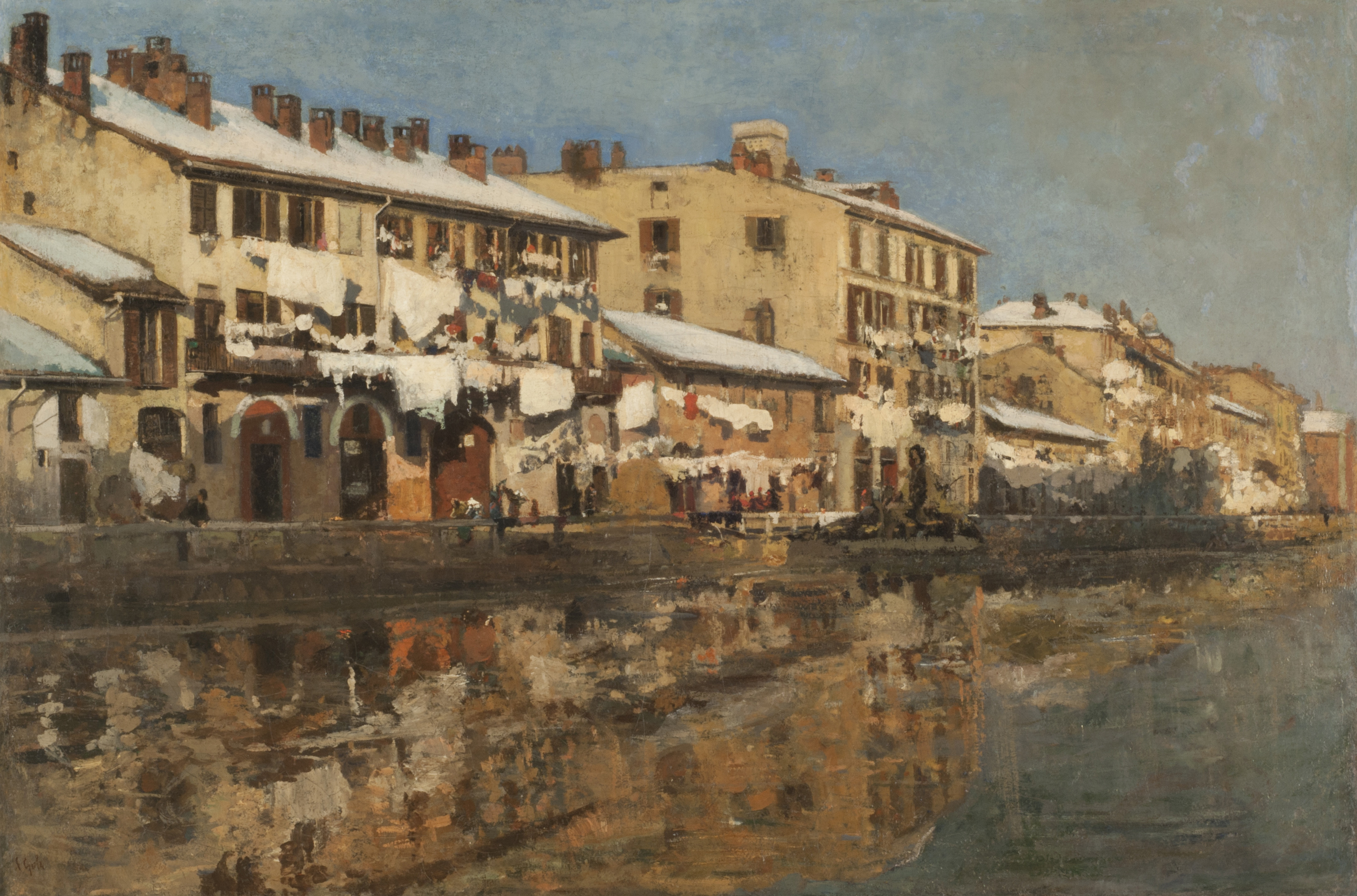 Emilio Gola, El Naviglio de Milán (Tít. ant.: Lungo il naviglio). Ca. 1890/1892. 101,5 x 149 cm, óleo sobre tela. Inv. 2479.